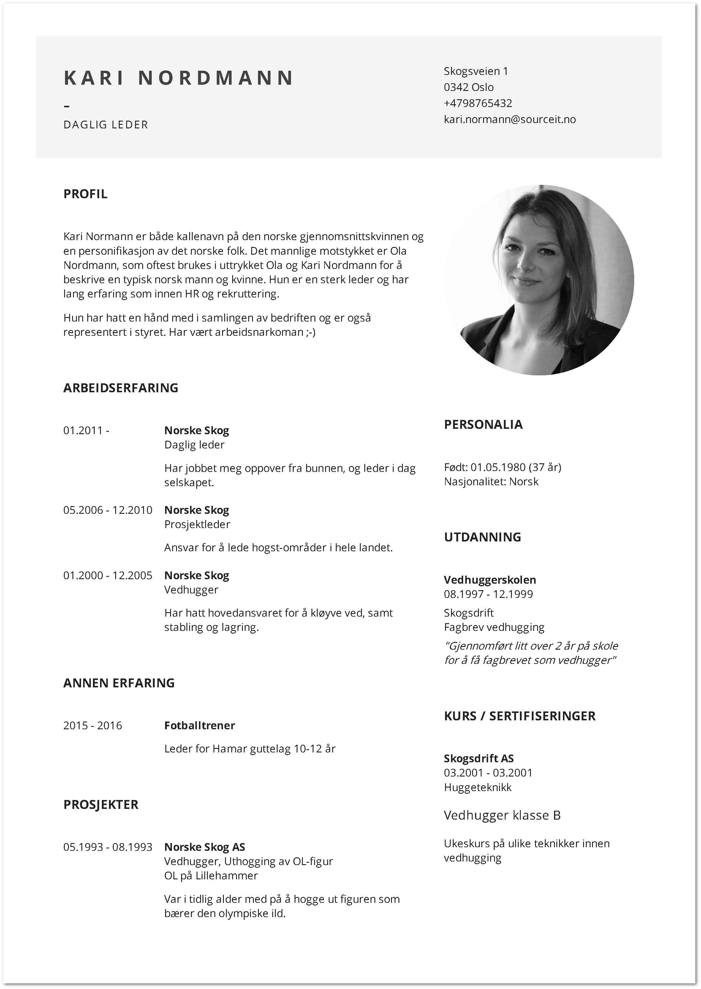 Eksempel på en moderne CV.